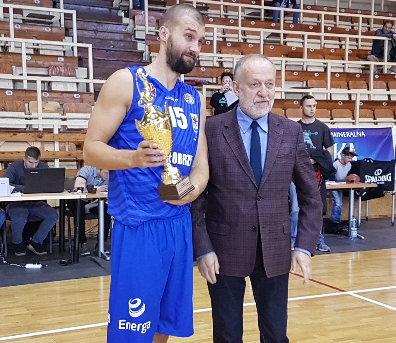 Energa Kotwica Kołobrzeg, 4 miejsce w Memoriale Romana Wysockiego